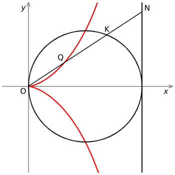 Costruzione della cissoide di Diocle. Construction of cissoid of Diocles.